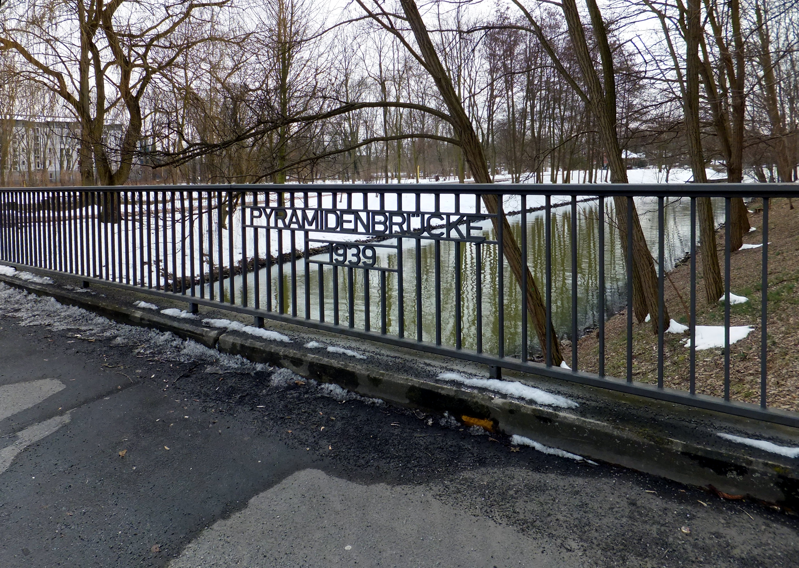 An der Wuhlheide in Berlin-Köpenick